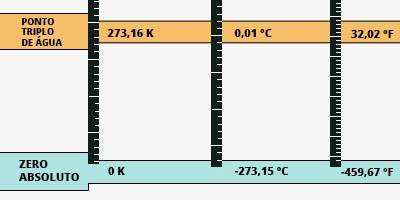 imagem ilustrativa contendo as escalas termométricas Celsius, Kelvin e Fahrenheit